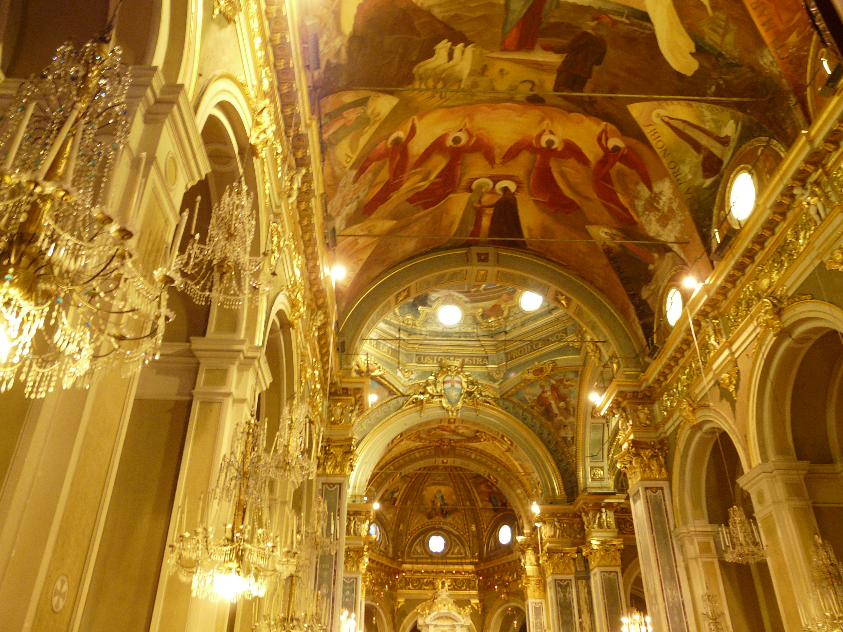 Santuario di Nostra Signora della Guardia, Ceranesi, Liguria, Italia